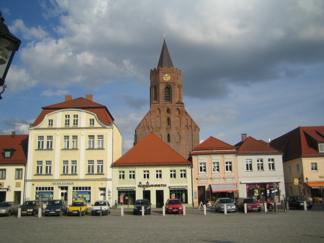 Marktplatz mit Marienkirche in Beeskow, Brandenburg, Deutschland.